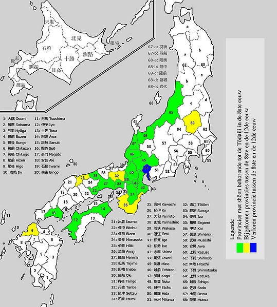 Kaart van Japan met de verschillende provincies waar de Tōdaiji shōen bezat in de 8ste en/of 12de eeuw